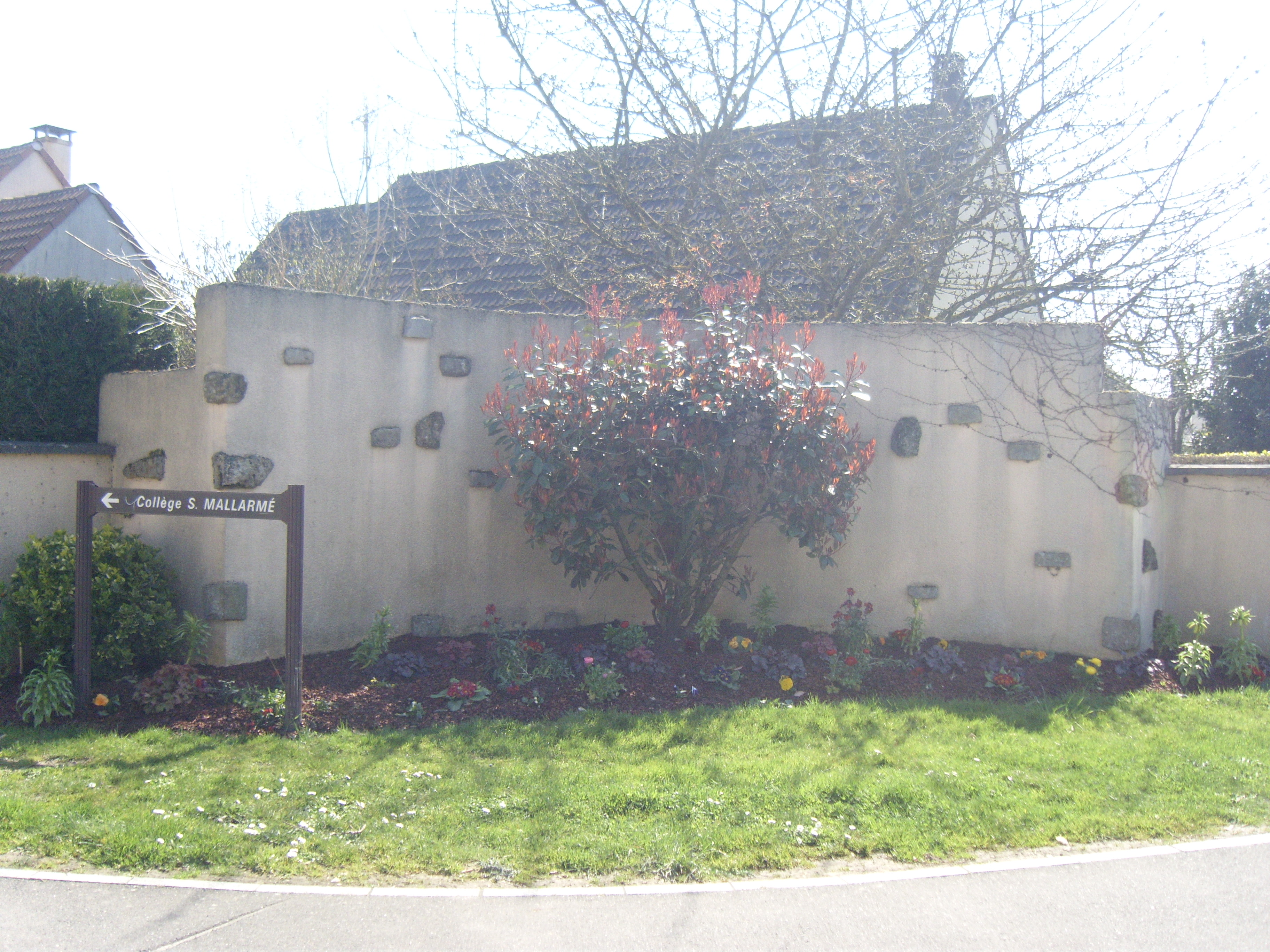 Parterre fleuri à Fontenay-Trésigny